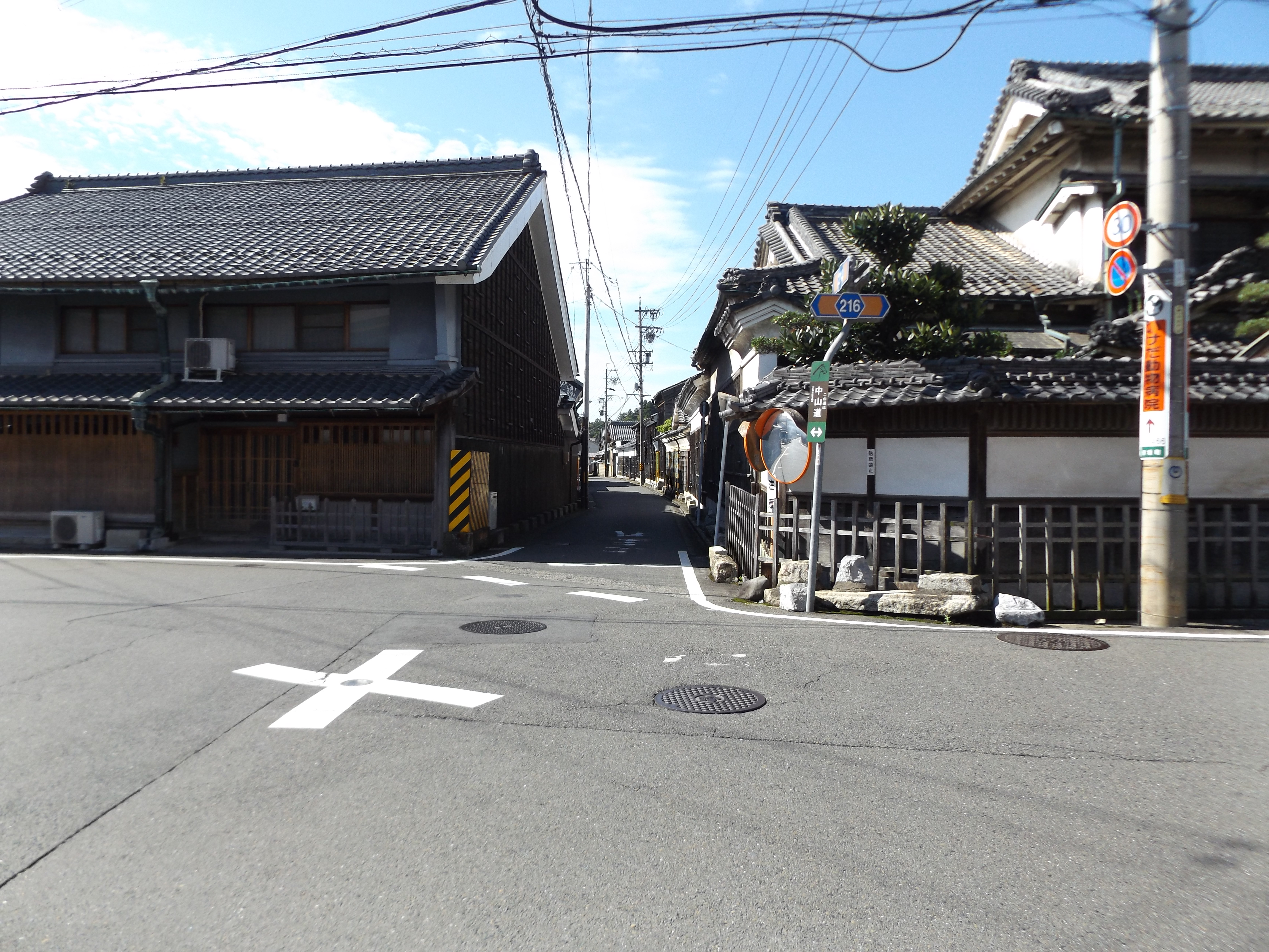 岐阜県大垣市赤坂町にある、岐阜県道214号養老赤坂線の終点。道幅が非常に狭くなっている。